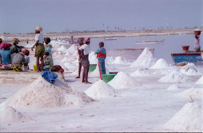 Lac Rose (Lac Retba), Dakar, Senegal